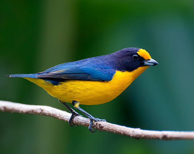 Registro-SP - Brasil